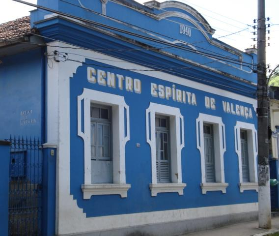 Façade du centre spirite de Valença, Brésil.